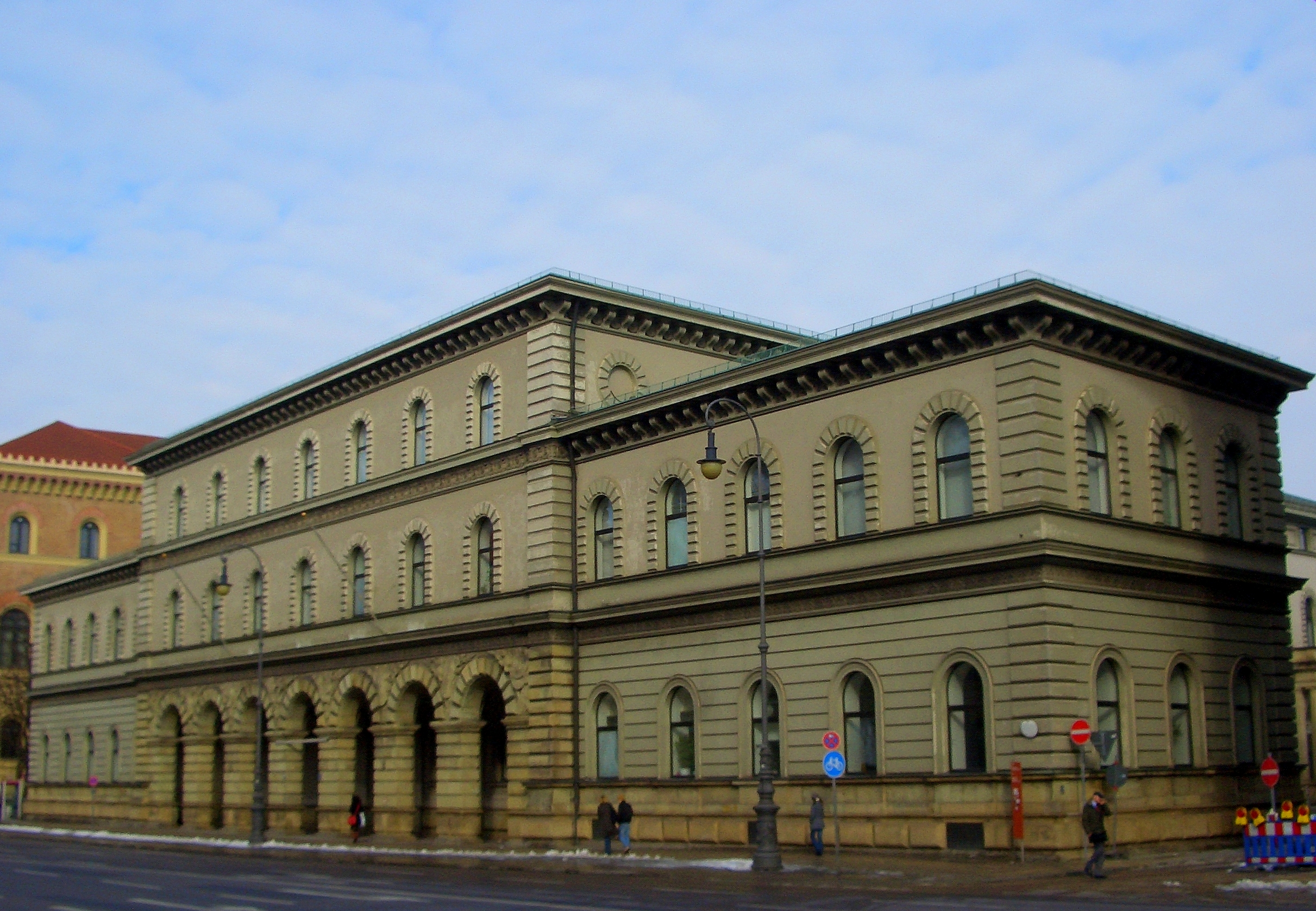 Gebäude des Ehemaligen Bayerisches Kriegsministerium in der Ludwigstraße München